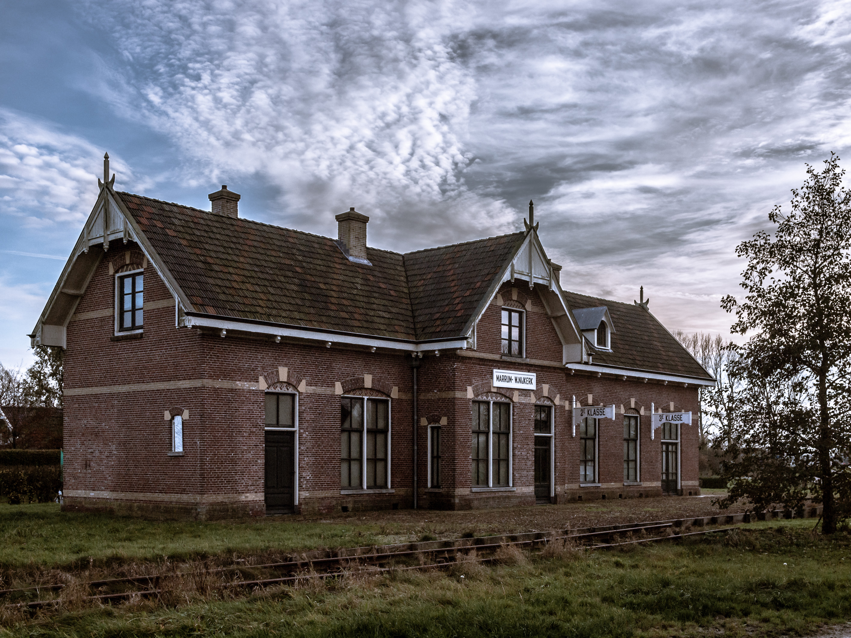 Het station van Marrum-Westernijkerk aan de voormalige spoorlijn Leeuwarden - Dokkum.